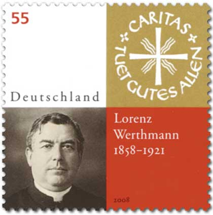 150. Geburtstag von Lorenz Werthmann (1858–1921), 55 cent